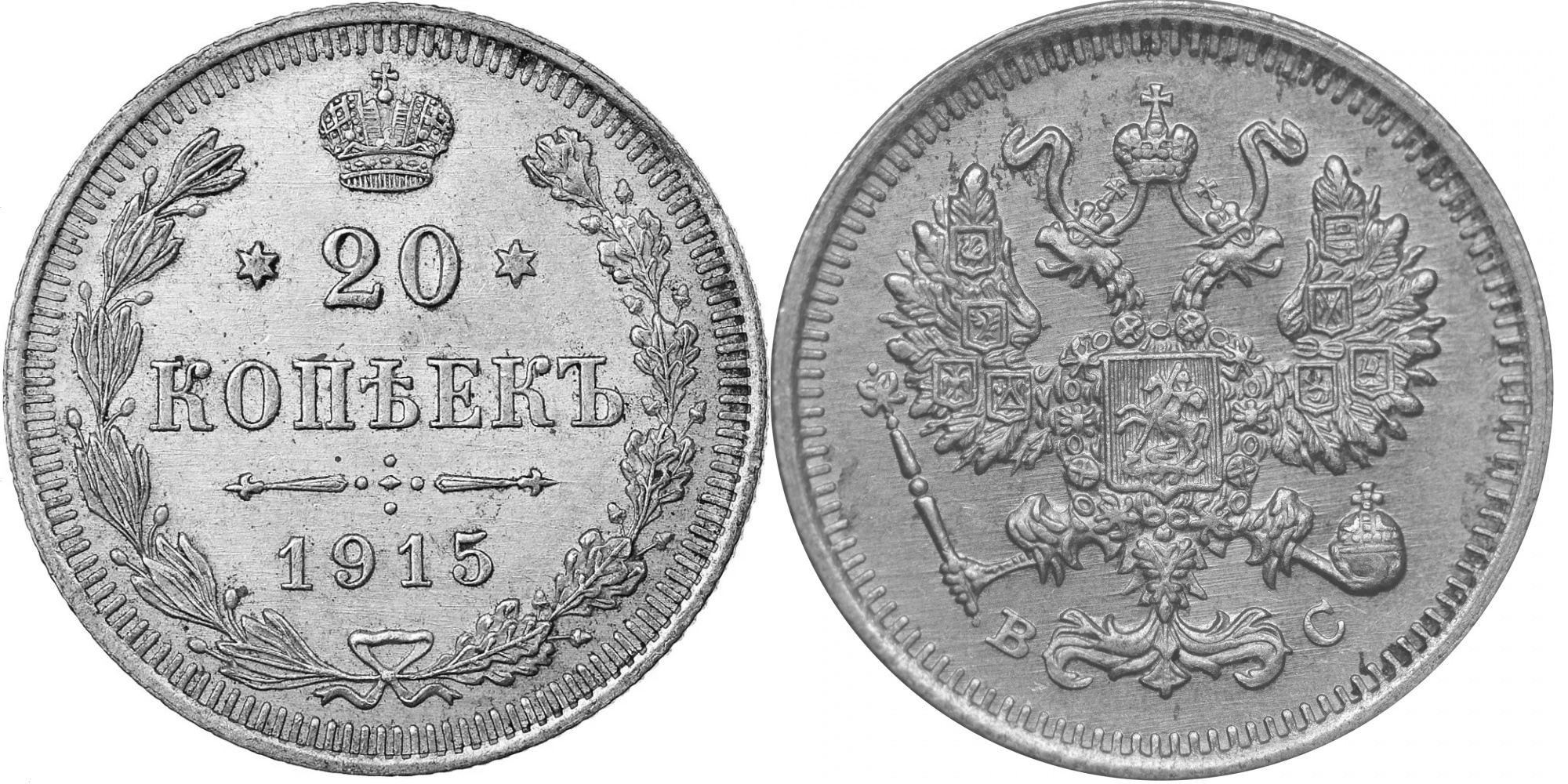 20 копеек 1915 года, серебро